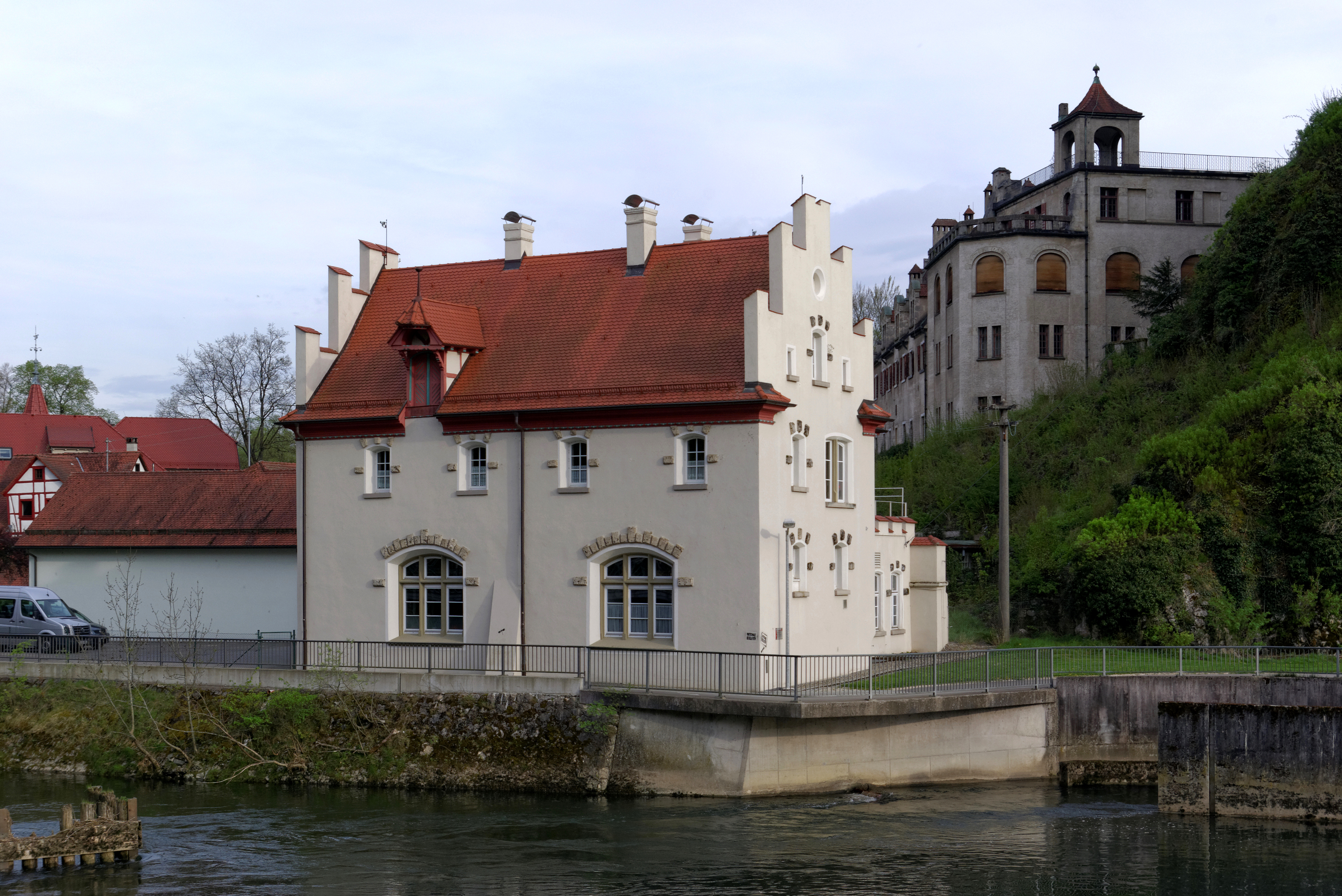 Sigmaringen, Altes Kraftwerk